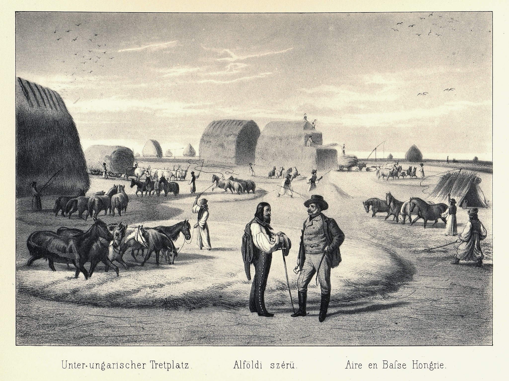 Alföldi szérü, Színes kőrajz; Magyarország